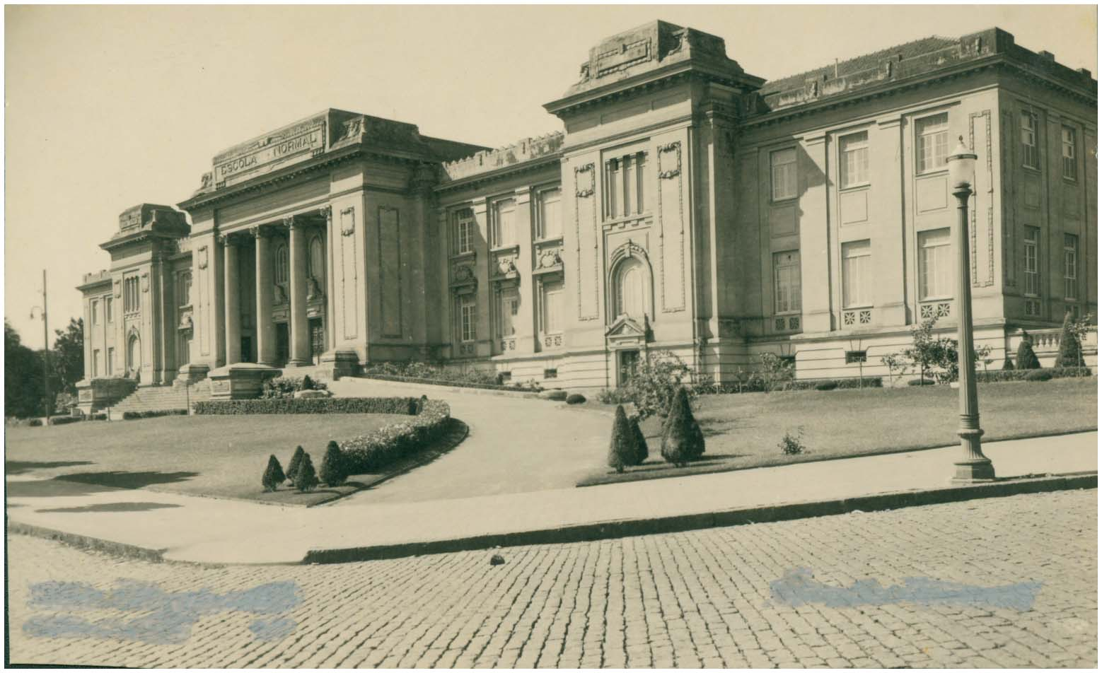 Escola Normal Modelo